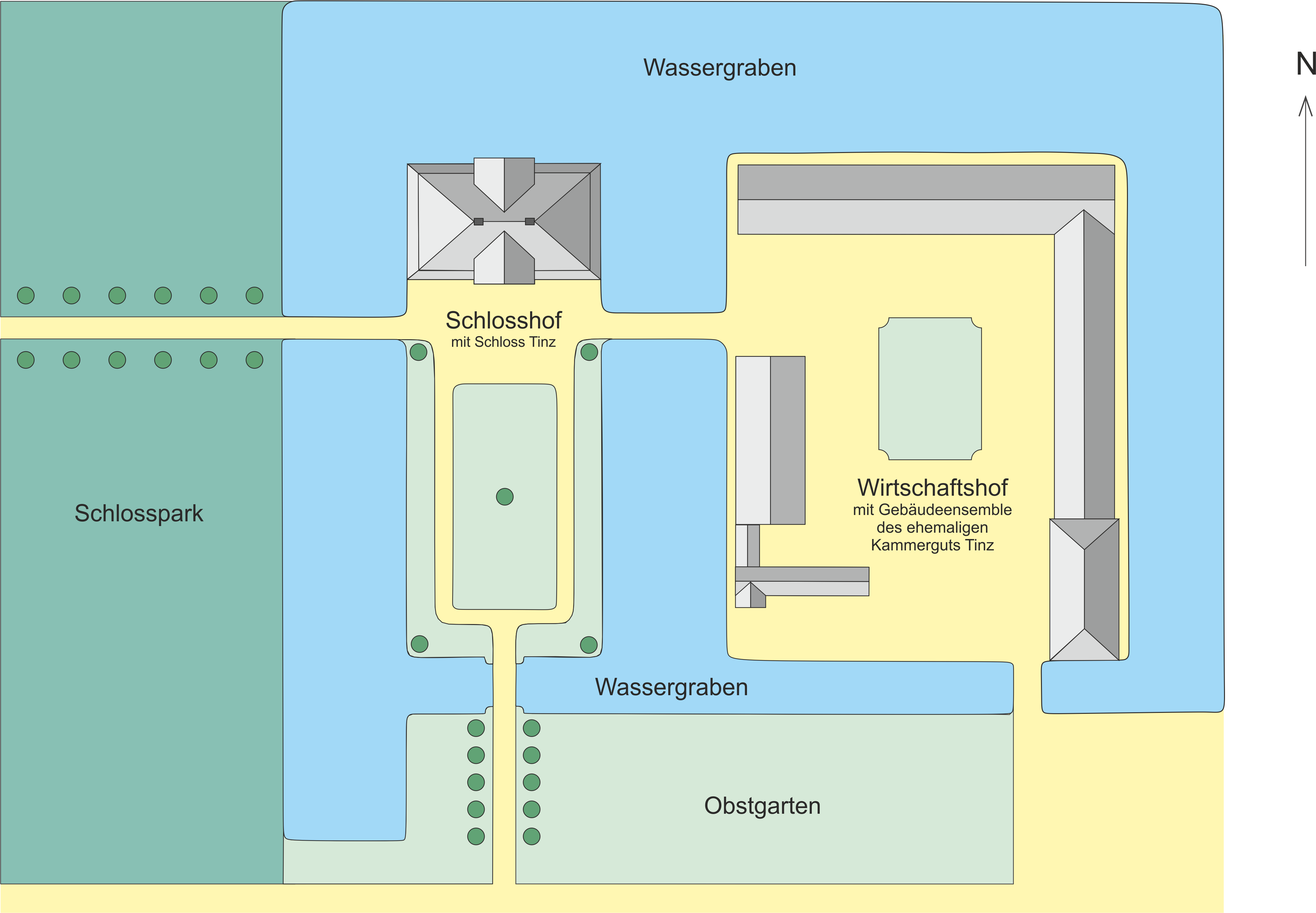 Lageplan Tinzer Schloss und Kammergut Ende des 18. Jahrhunderts